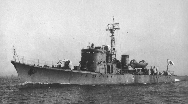 日本海軍第十三号型駆潜艇 『第十五号駆潜艇』、大阪湾